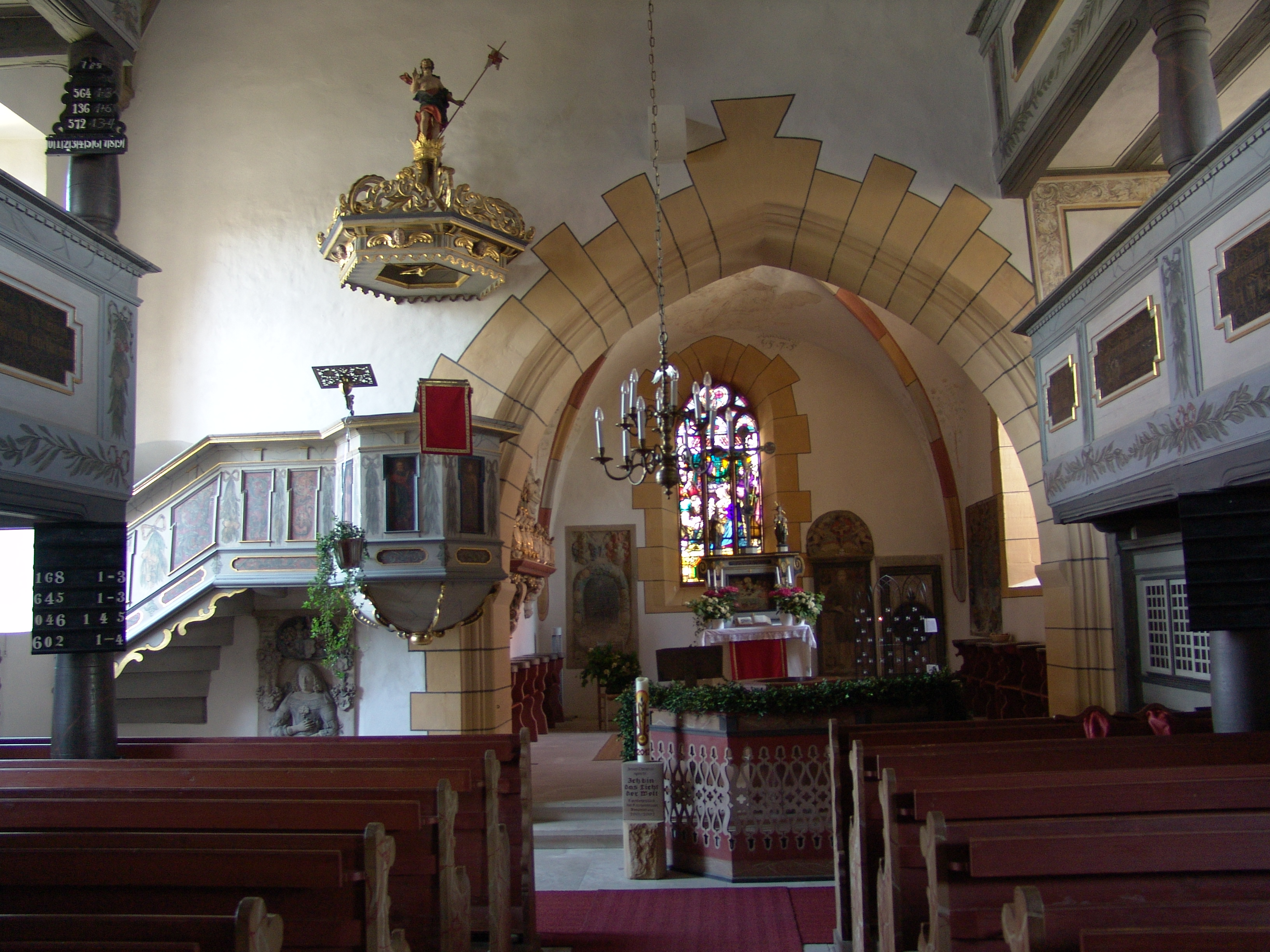 evang.-luth. Kirche St. Jakobus in Irmelshausen